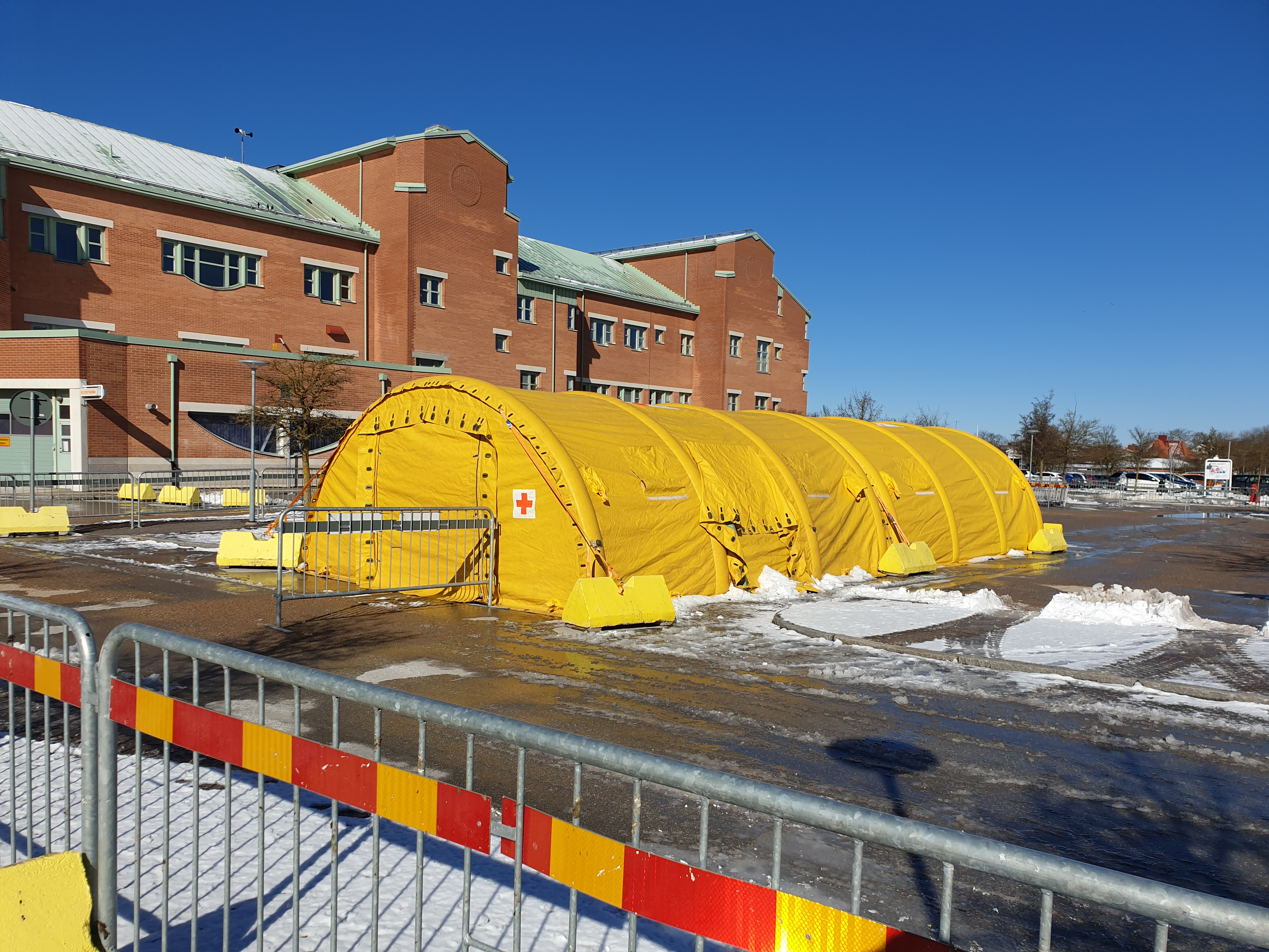 Visby lasarett